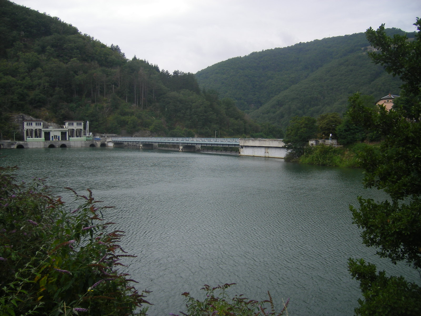 Barrage de Pinet - Tarn river